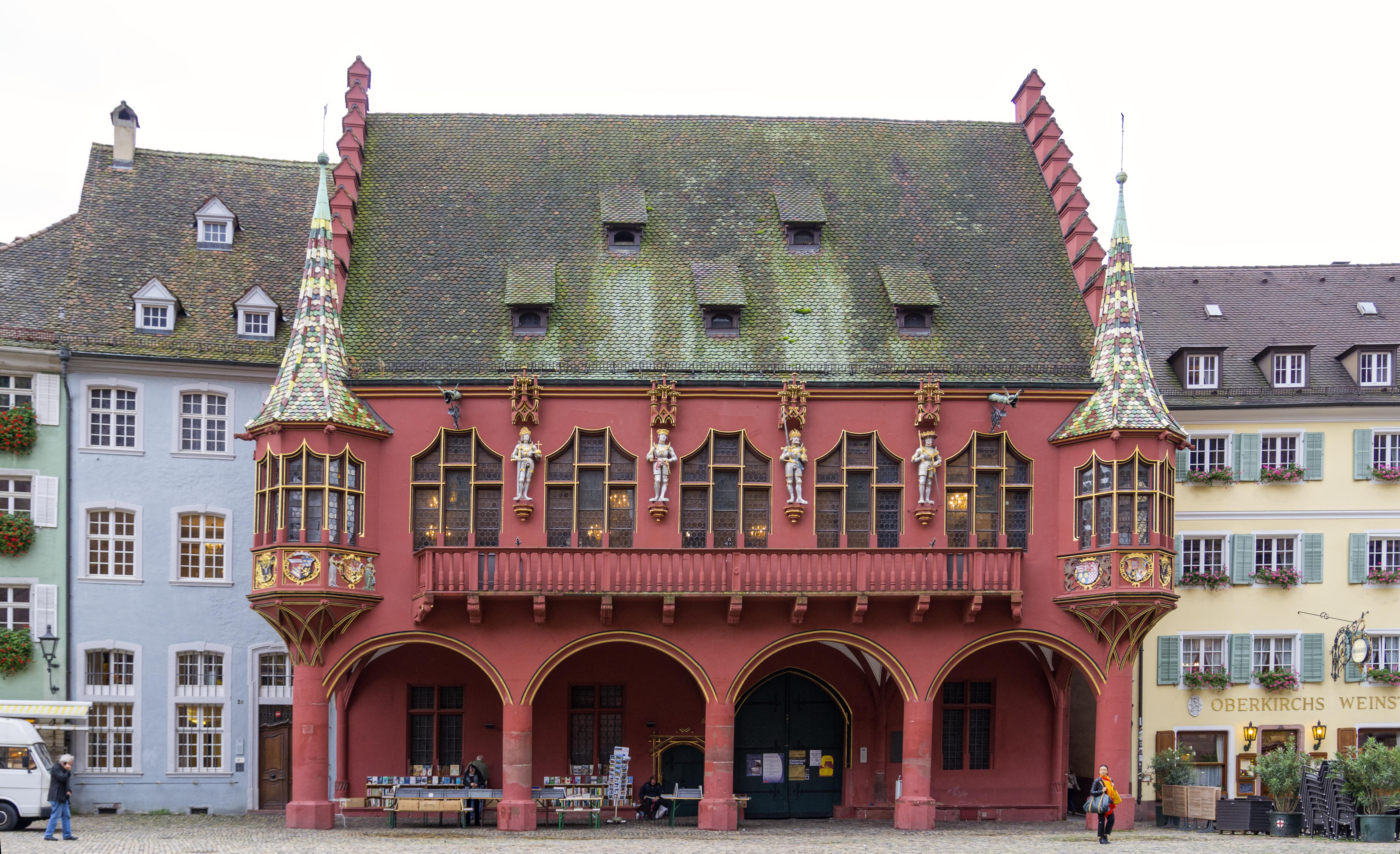 DFN Treffen am 12.09.2013 auf dem Freiburger Münsterplatz